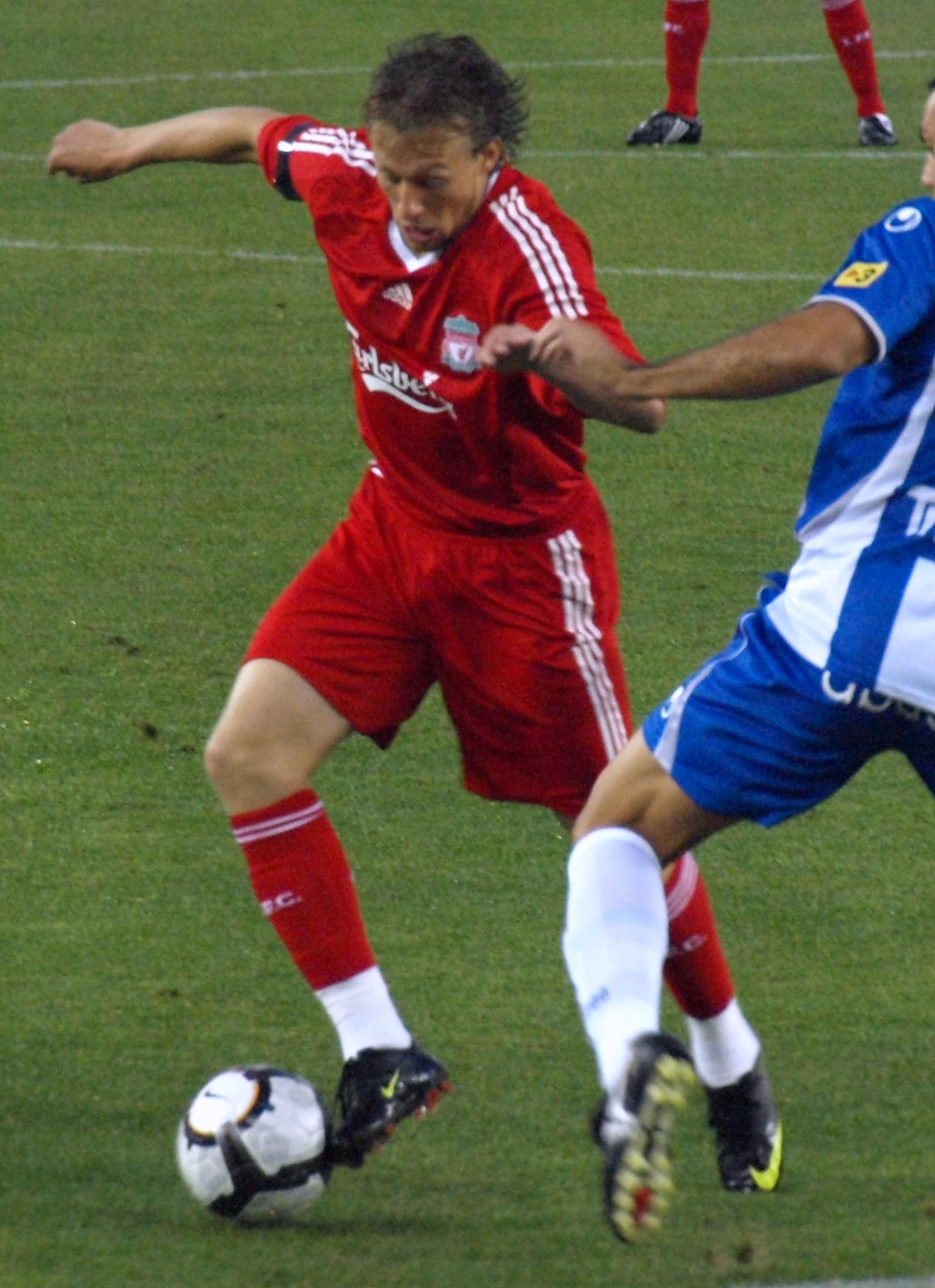 Lucas Leiva con la camiseta del Liverpool regateando a un contrario en el partido de presentación del Estadio de Cornella-El Prat disputado ante el RCD Español de Barcelona